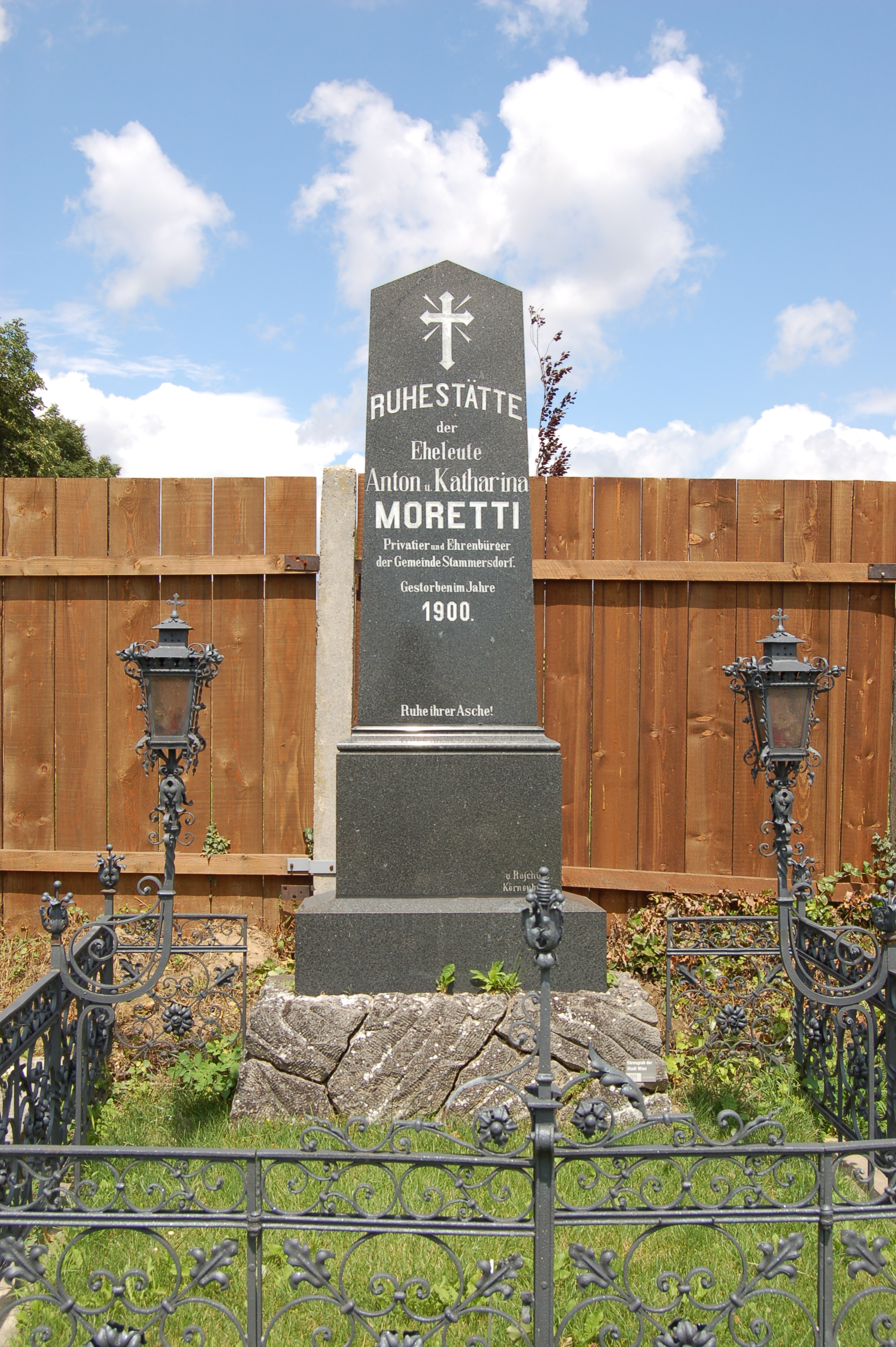 Friedhof Stammersdorf-Ort, ehrenhalber gewidmetes Grab von Anton Moretti, Bürgermeister und Wohltäter von Stammersdorf